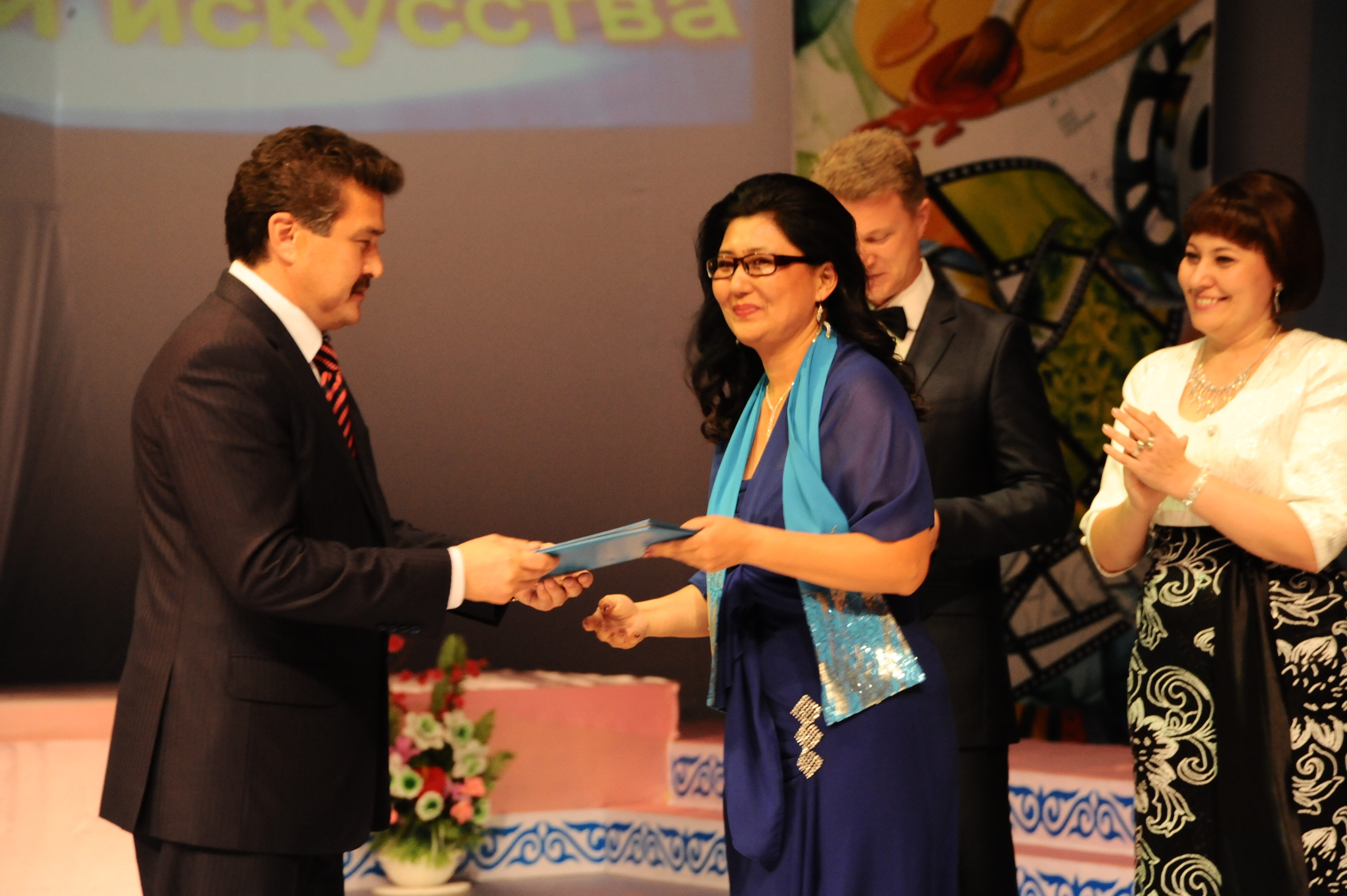 Дюсибаева Дариха Туребаевна, Ученый секретарь библиотеки награждена почетной грамотой акима Костанайской области, 2012 г.